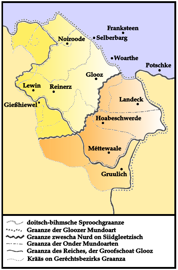 Karte des glätzischen Mundartgebietes Schläsch: Koarte des gleetzischen Mundoartgebietes